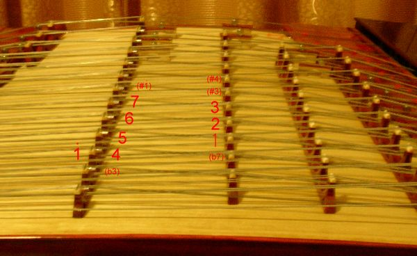 投搞、撮影、加工 Koika